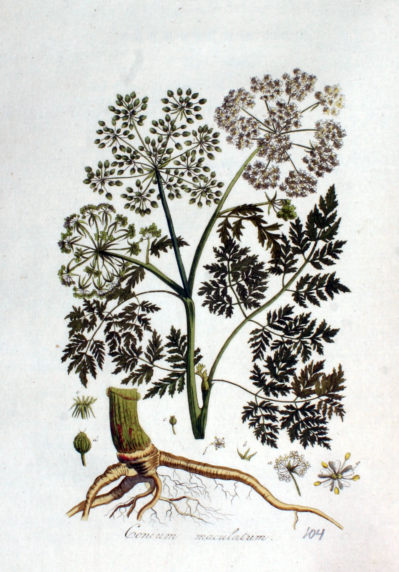 Conium maculatum L.